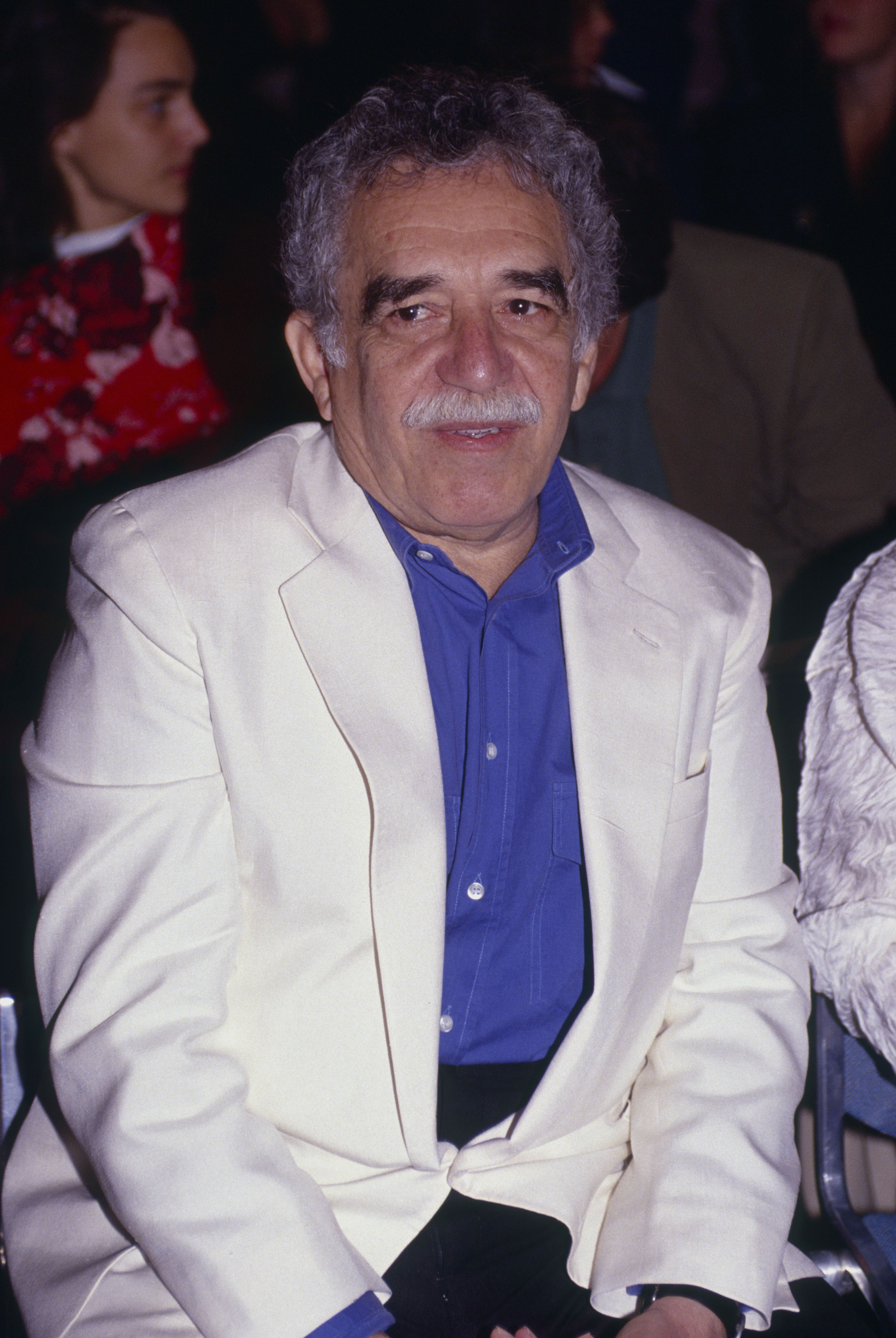 gabriel garcia marquez